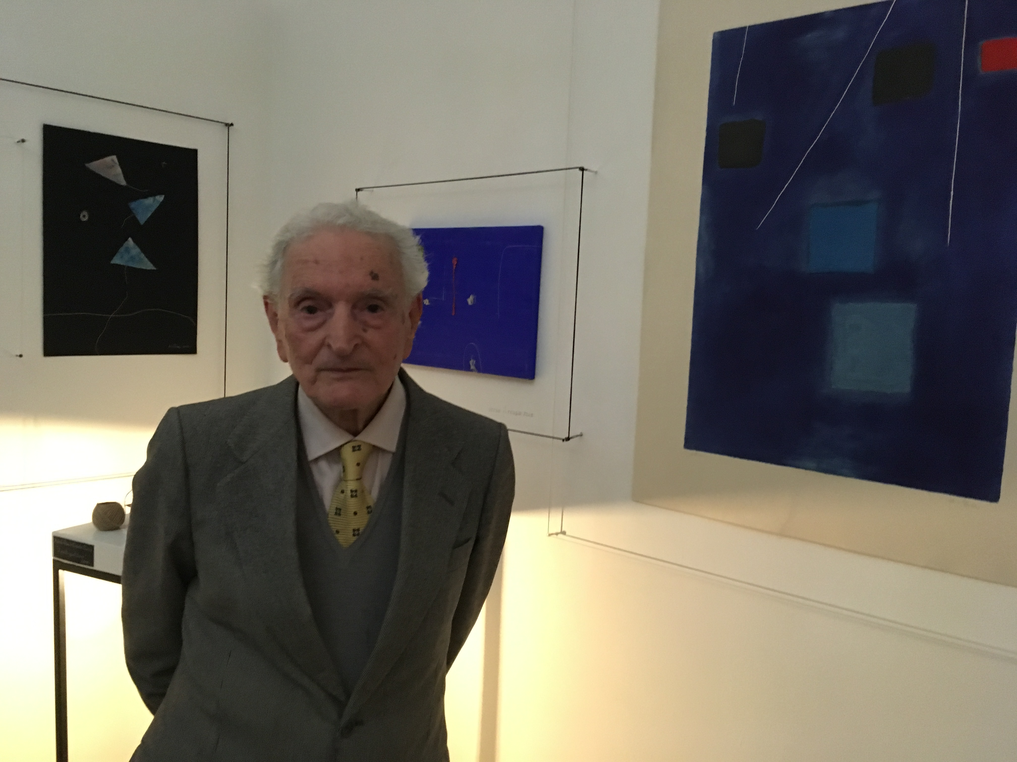 ritratto durante la mostra antologica 'sul filo del discorso' presso settimopiano - Termoli